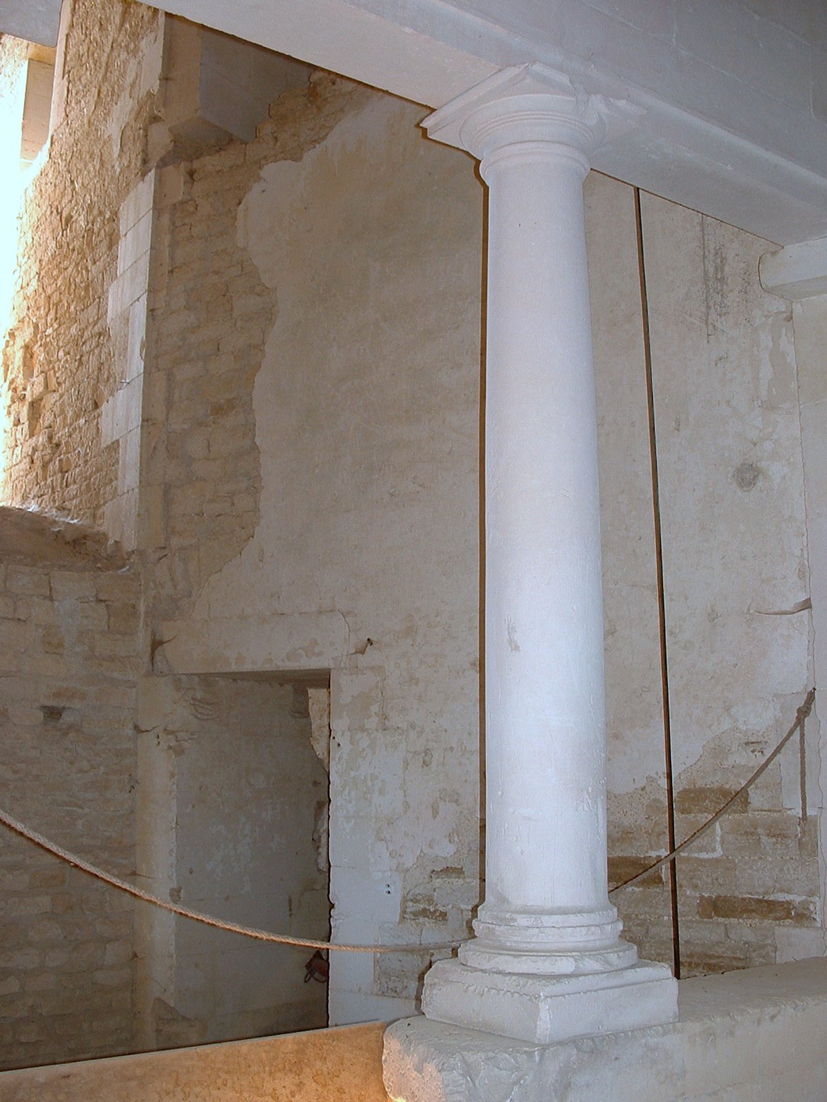 Château de Maulnes, Cruzy-le-Châtel, Yonne